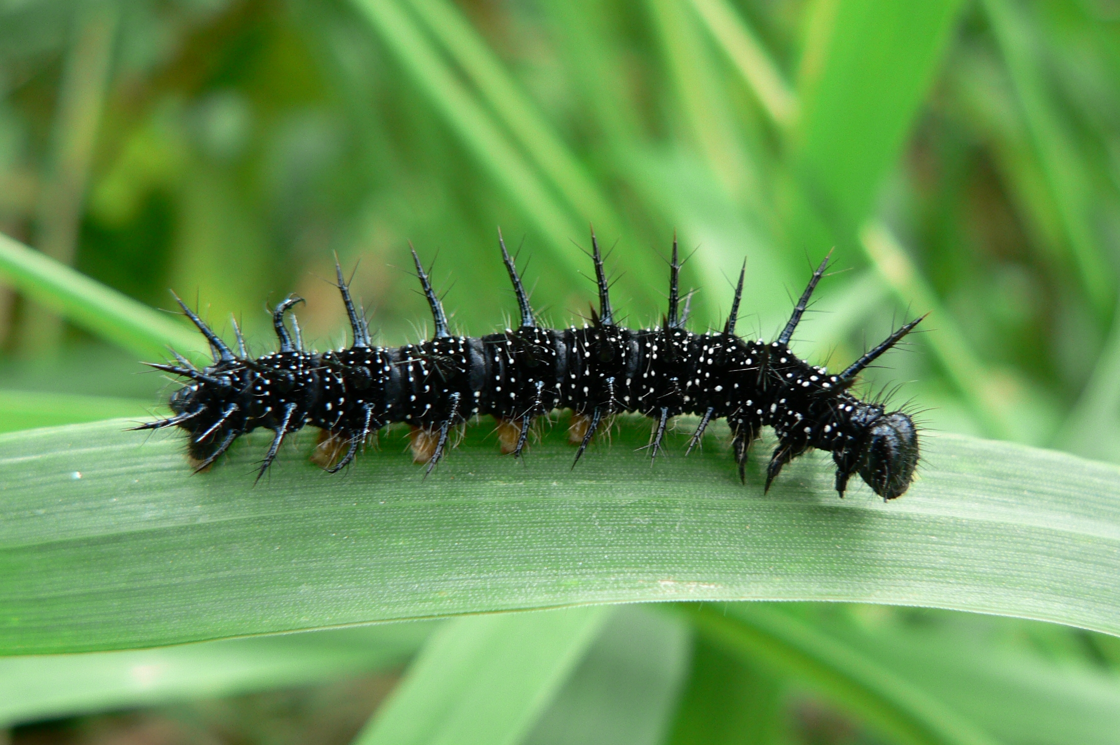 Chenille de Paon du jour (Nymphalis io, anciennement Inachis io)